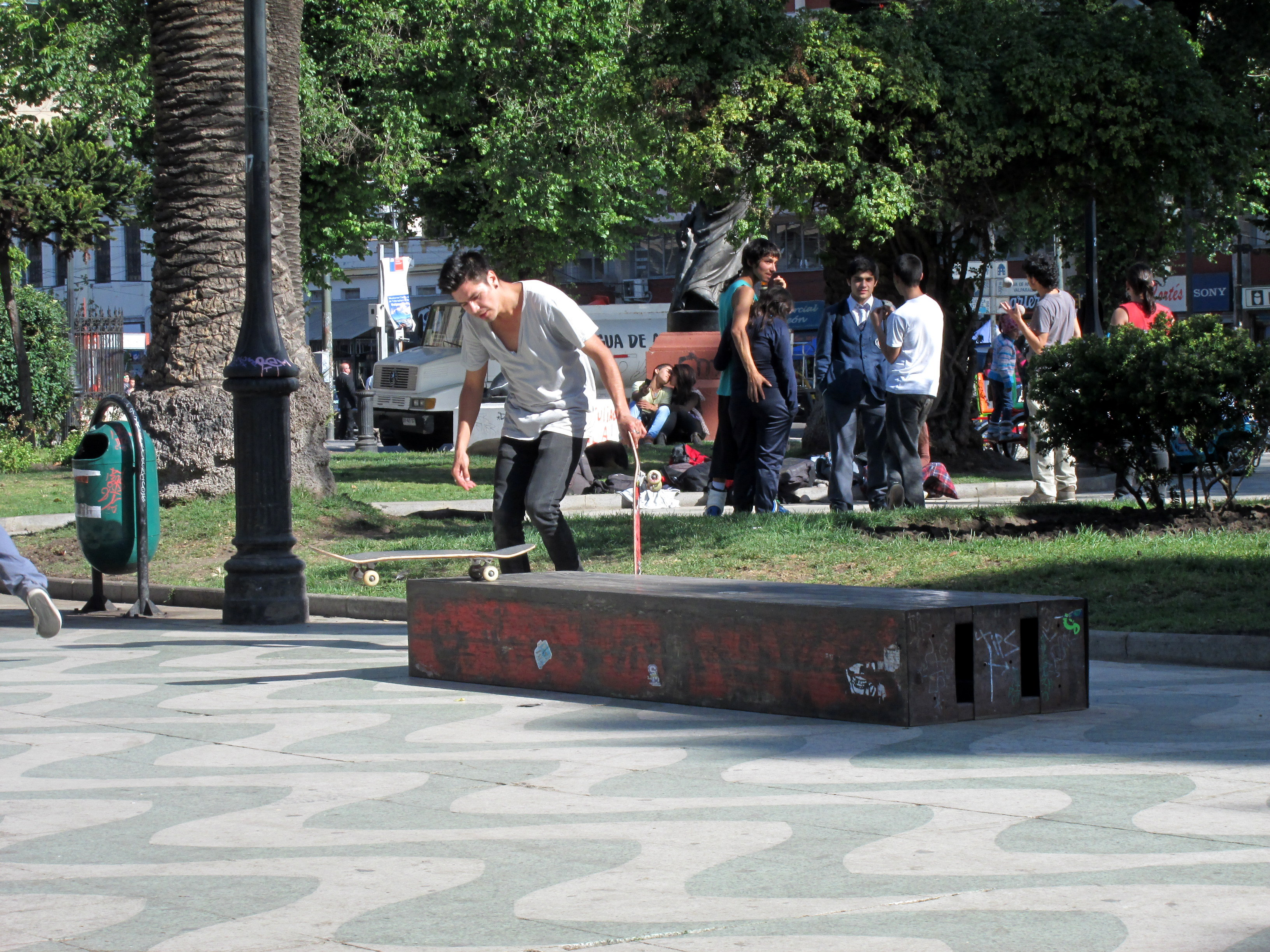 Skater en la Plaza Victoria, Valparaíso.